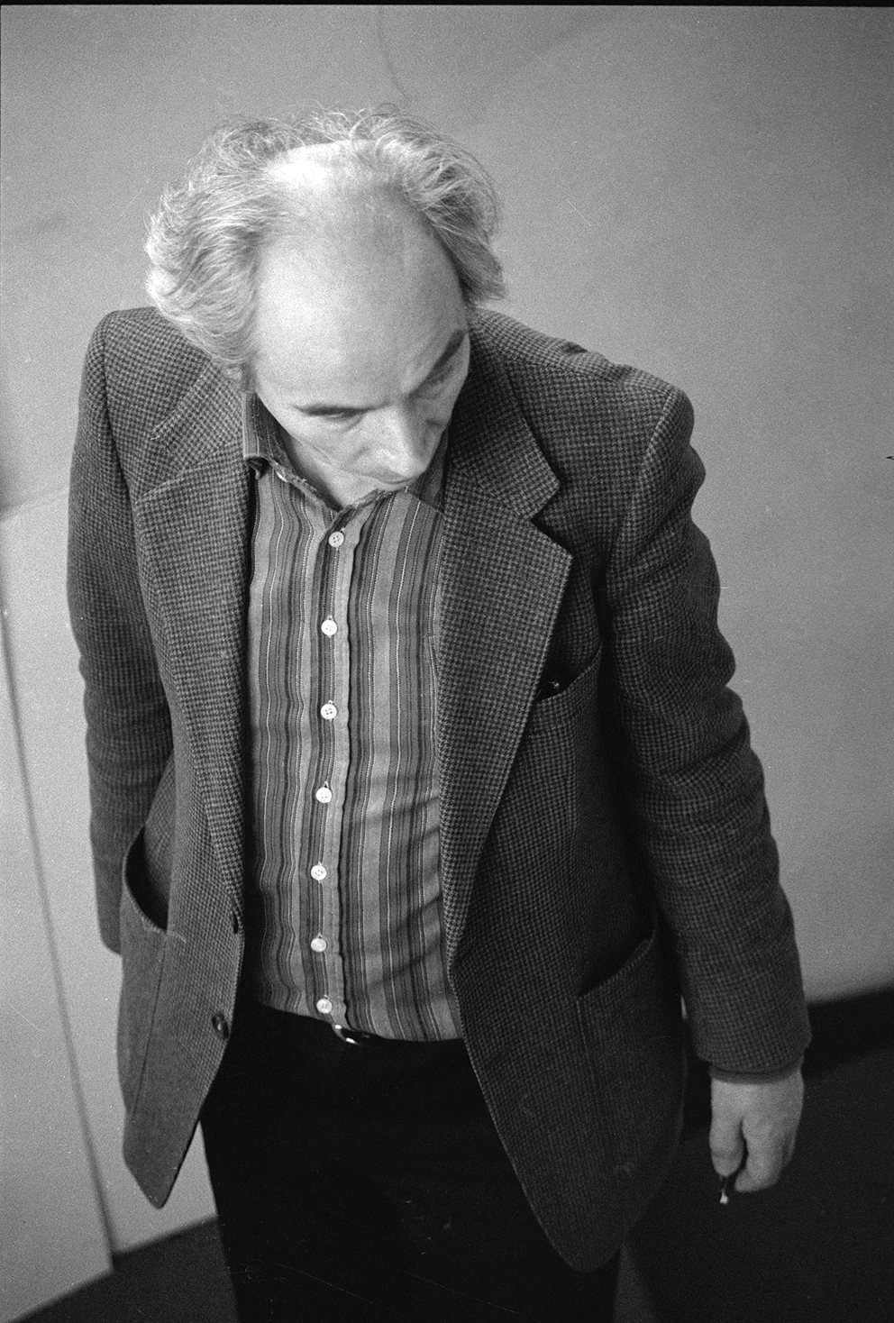 Hasn Schmidt im Klingspormuseum ca. 1983